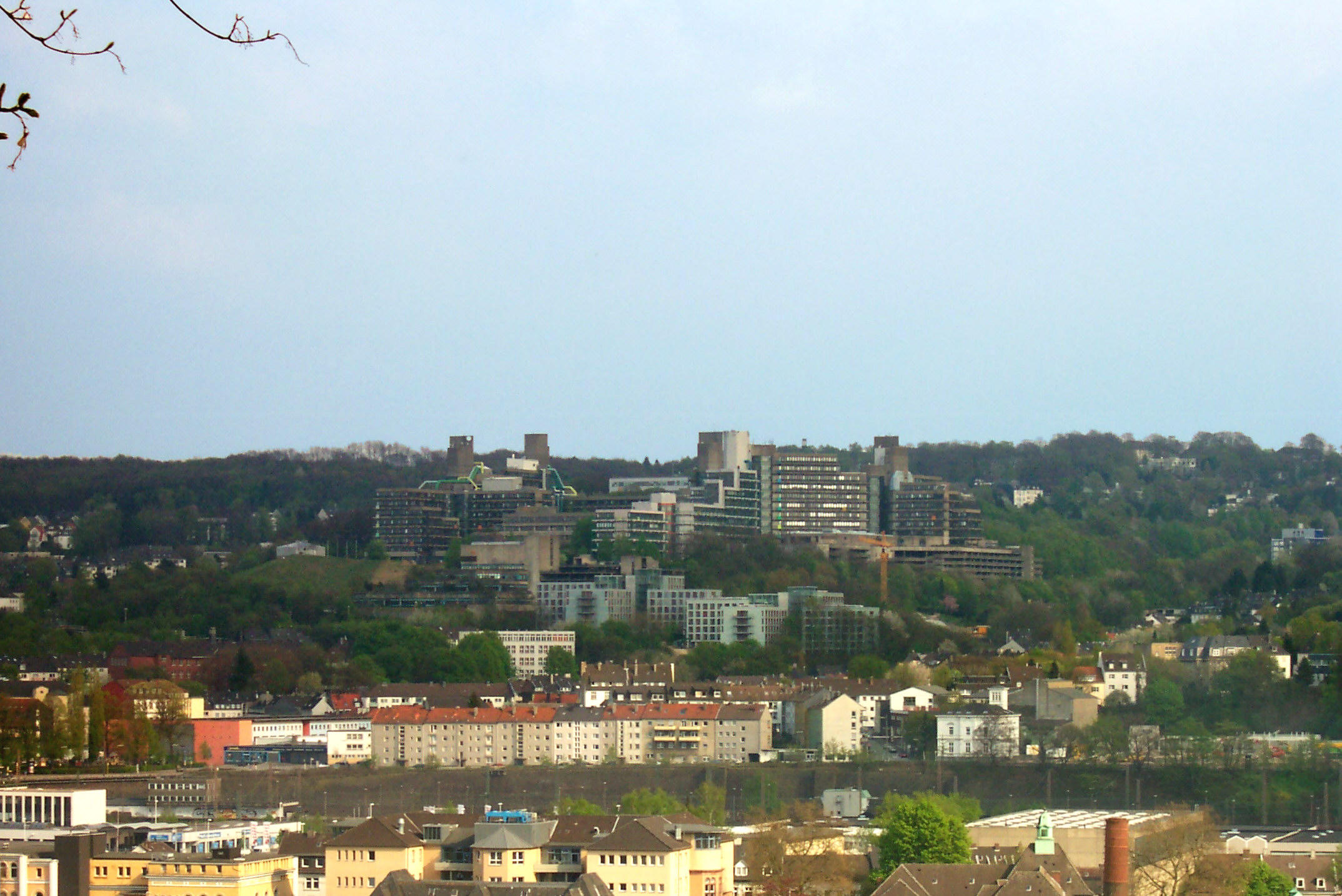 Universität Wuppertal